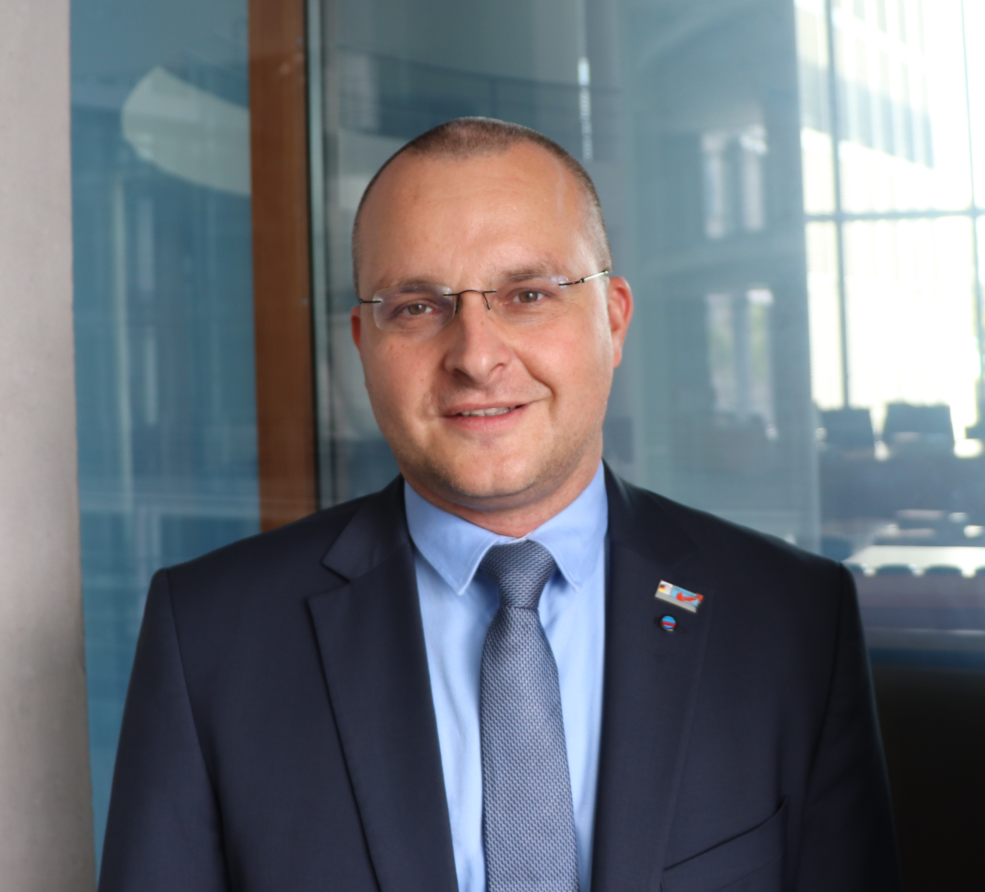 Portrait